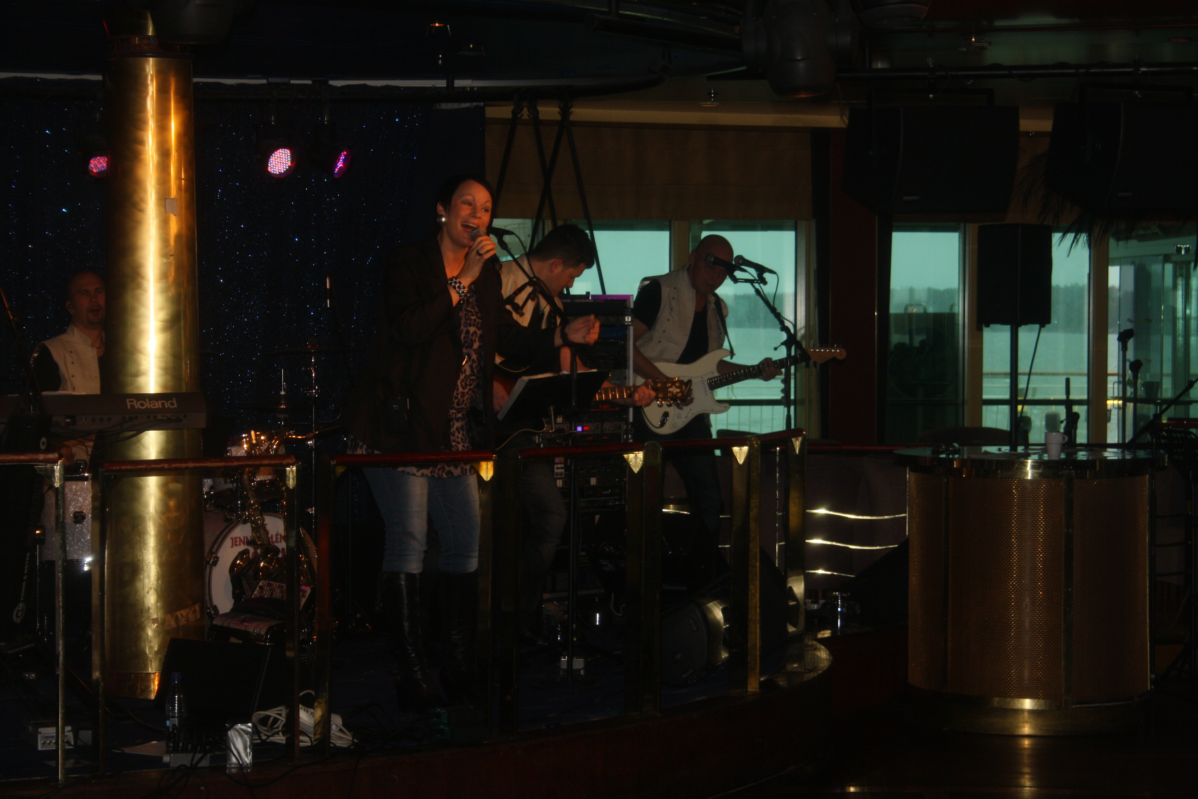 Dansbandet Jenny Saléns på Birka Paradise.